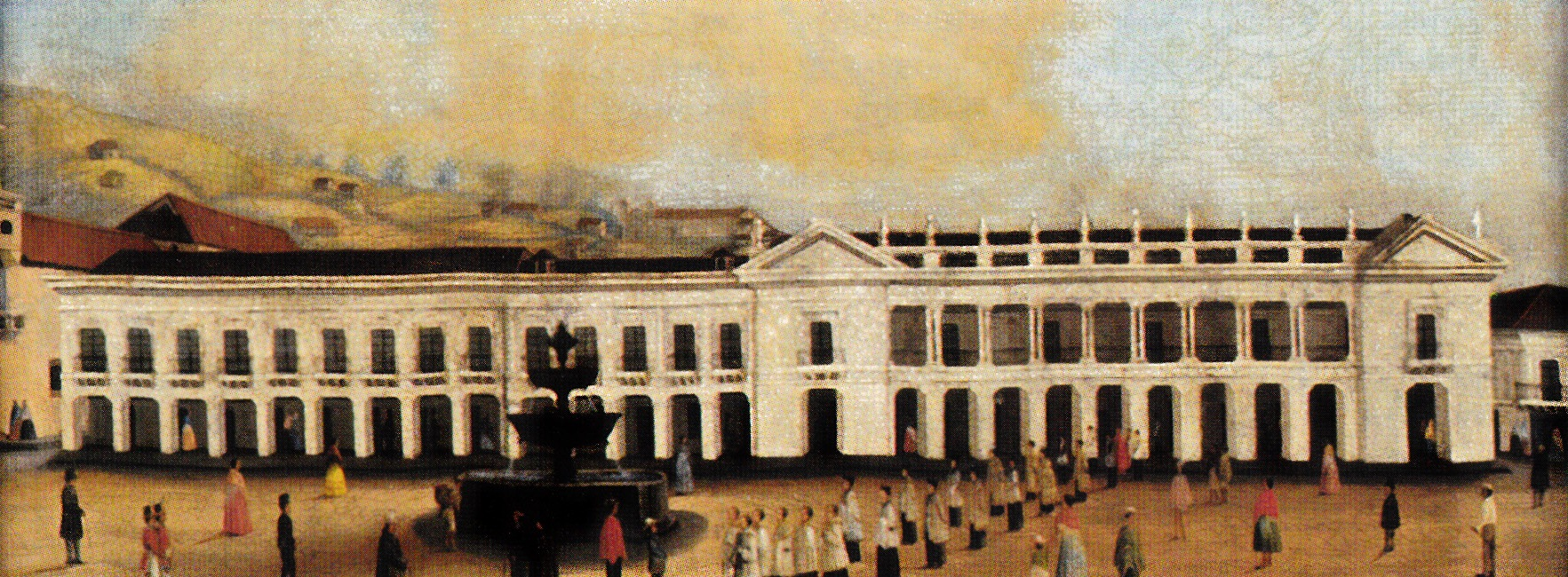 "Palacio Arzobispal". Óleo de Rafael Salas de mediados del siglo XIX. Representa el edificio del Palacio Arzobispal de Quito en la época.